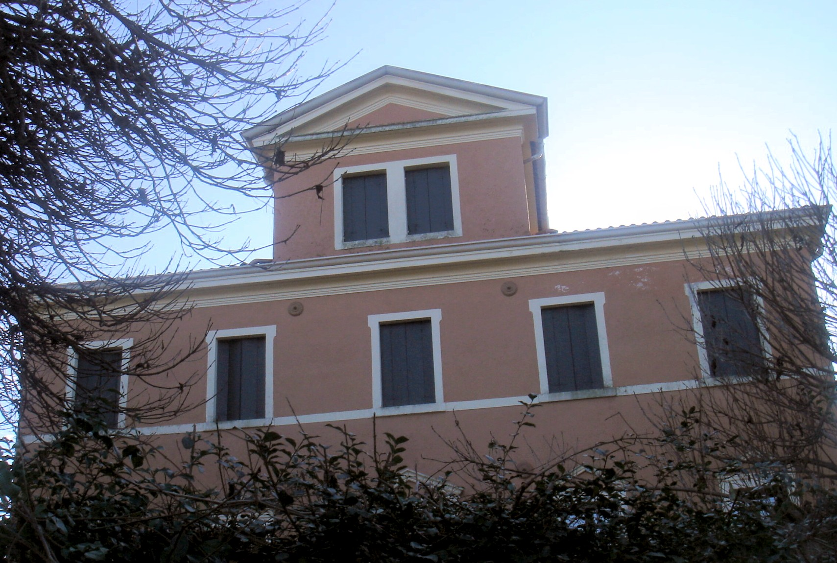 Collalbrigo di Conegliano (Treviso): Villa Ceotti Cosulich (XIX secolo).